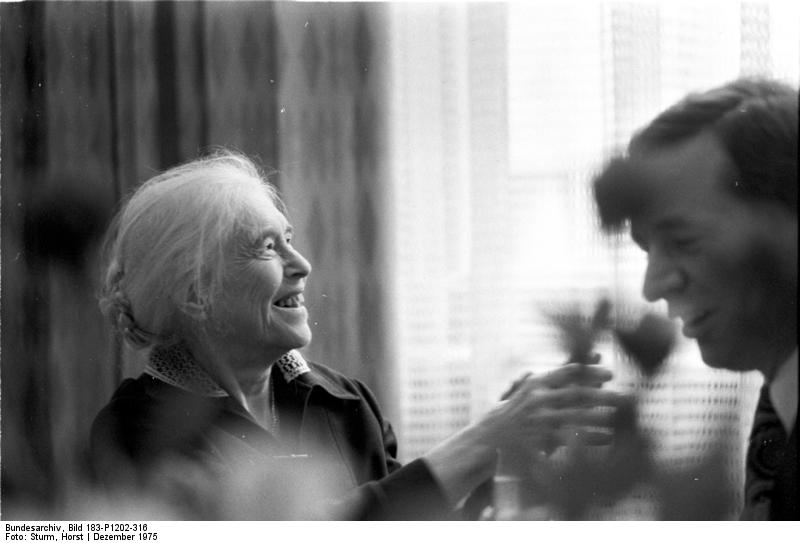 Anna Seghers, Schriftstellerin ADN-ZB/Sturm 2.12.75 Berlin: Anna Seghers, Schriftstellerin, Präsidentin des Schriftstellerverbandes der DDR. Abgebildete Personen: Seghers, Anna: Schriftstellerin, Präsidentin des Schriftstellerverbandes, DDR (GND 118612743)